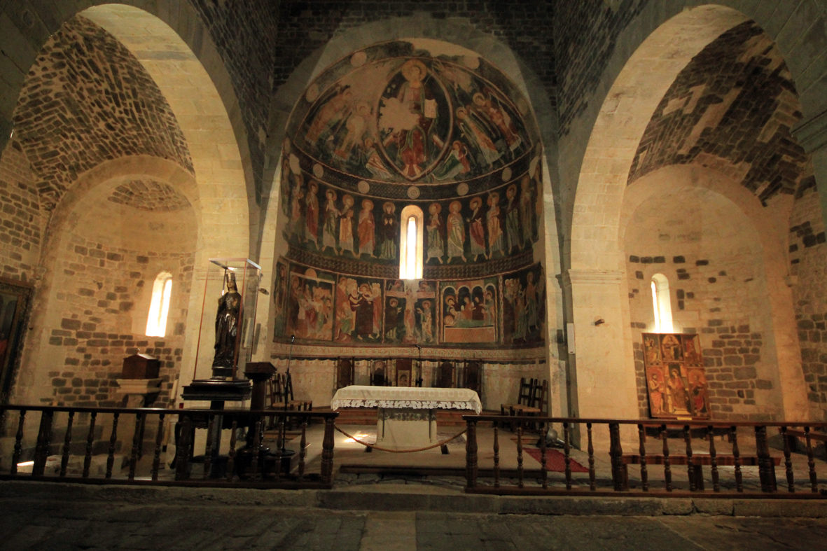 The Apse Frescoes, Santissima Trinità di Saccargia, Codrongianos, Province of Sassari, Sardinia, Italy